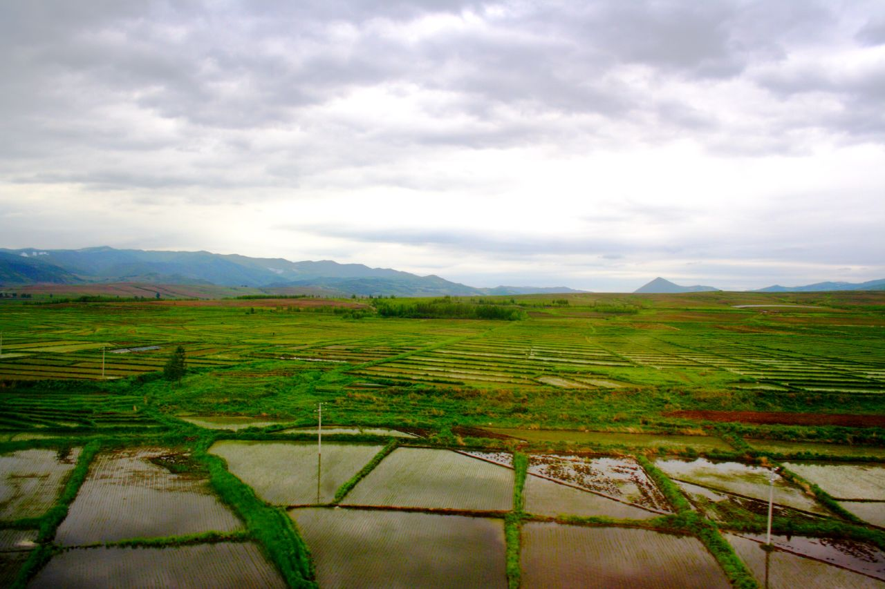 In campagna Dongbei 东北, China, June, 2009